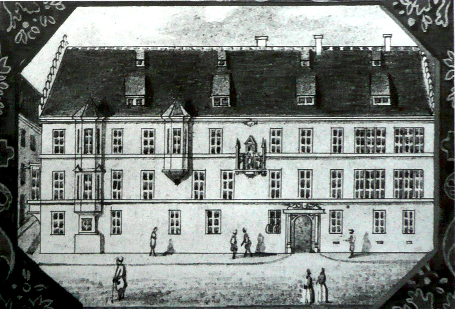 Basler Hof in Freiburg Anfang des 19. Jahrhunderts.